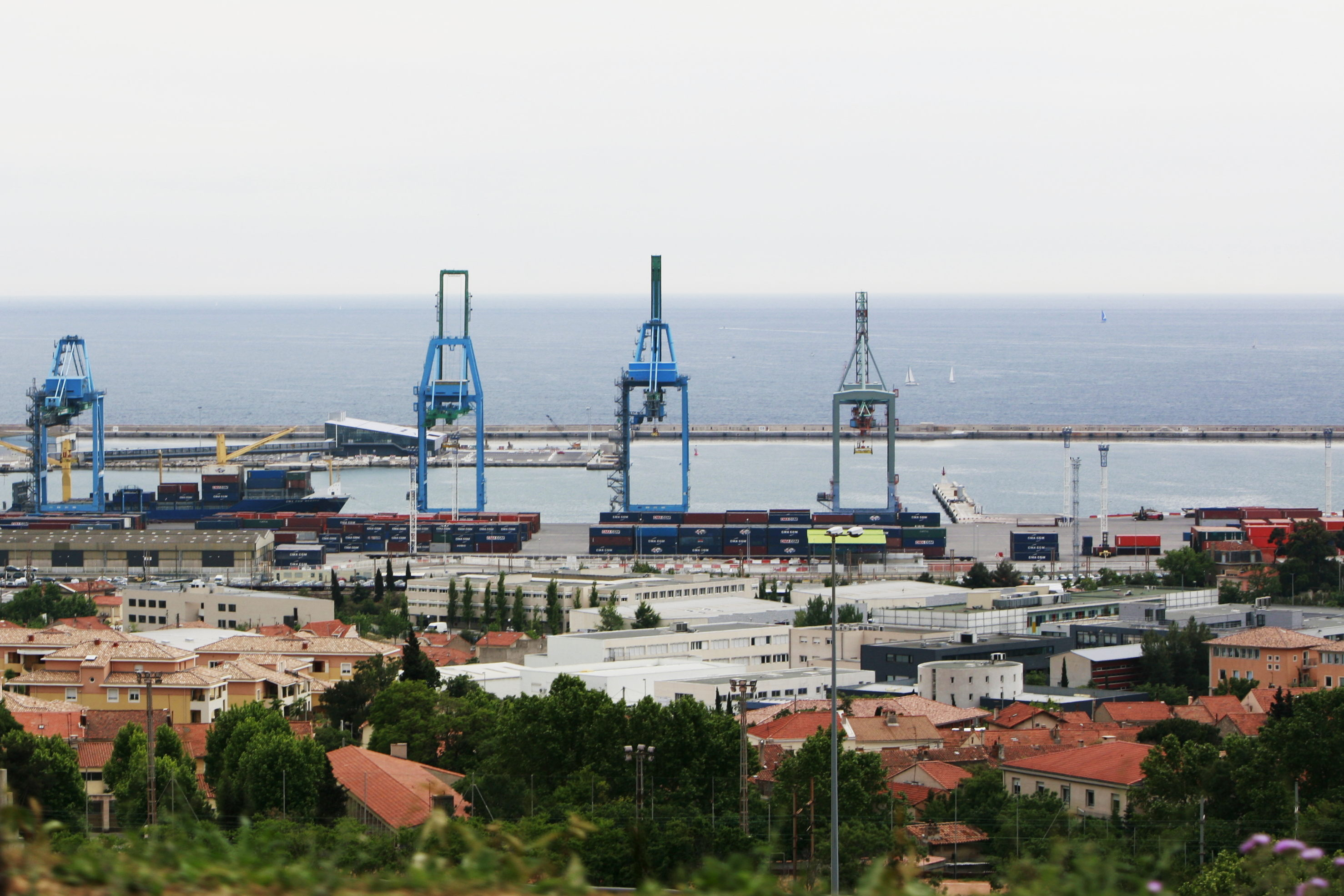 Marseille harbour